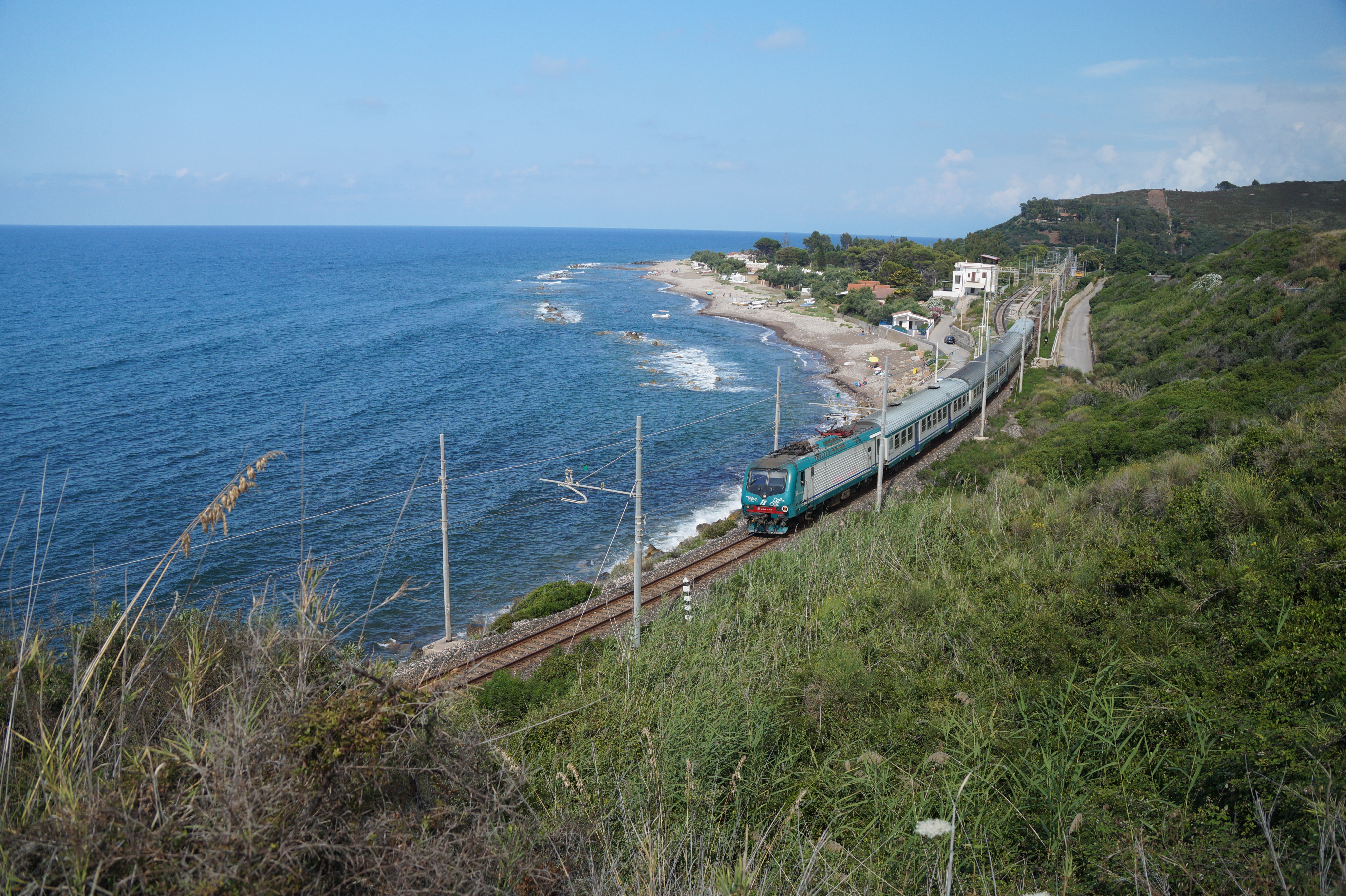 Regionalzug bei Pollina